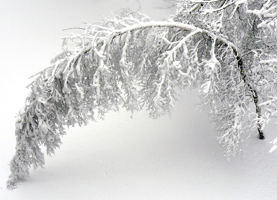 Après plus de 20cm de neige, ce bouleau ne s'est pas cassé. Il s'est plié comme le roseau